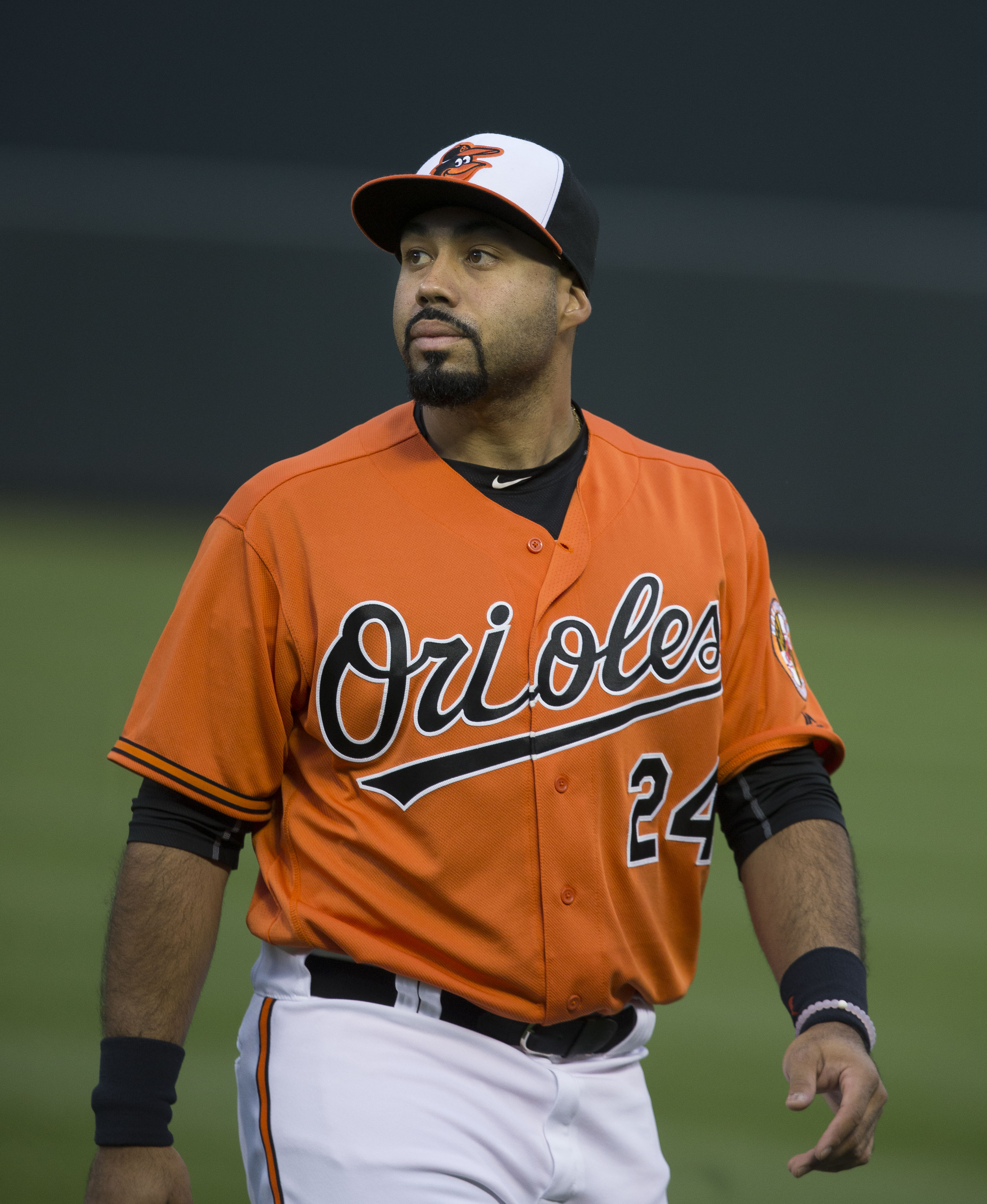 Pedro Álvarez